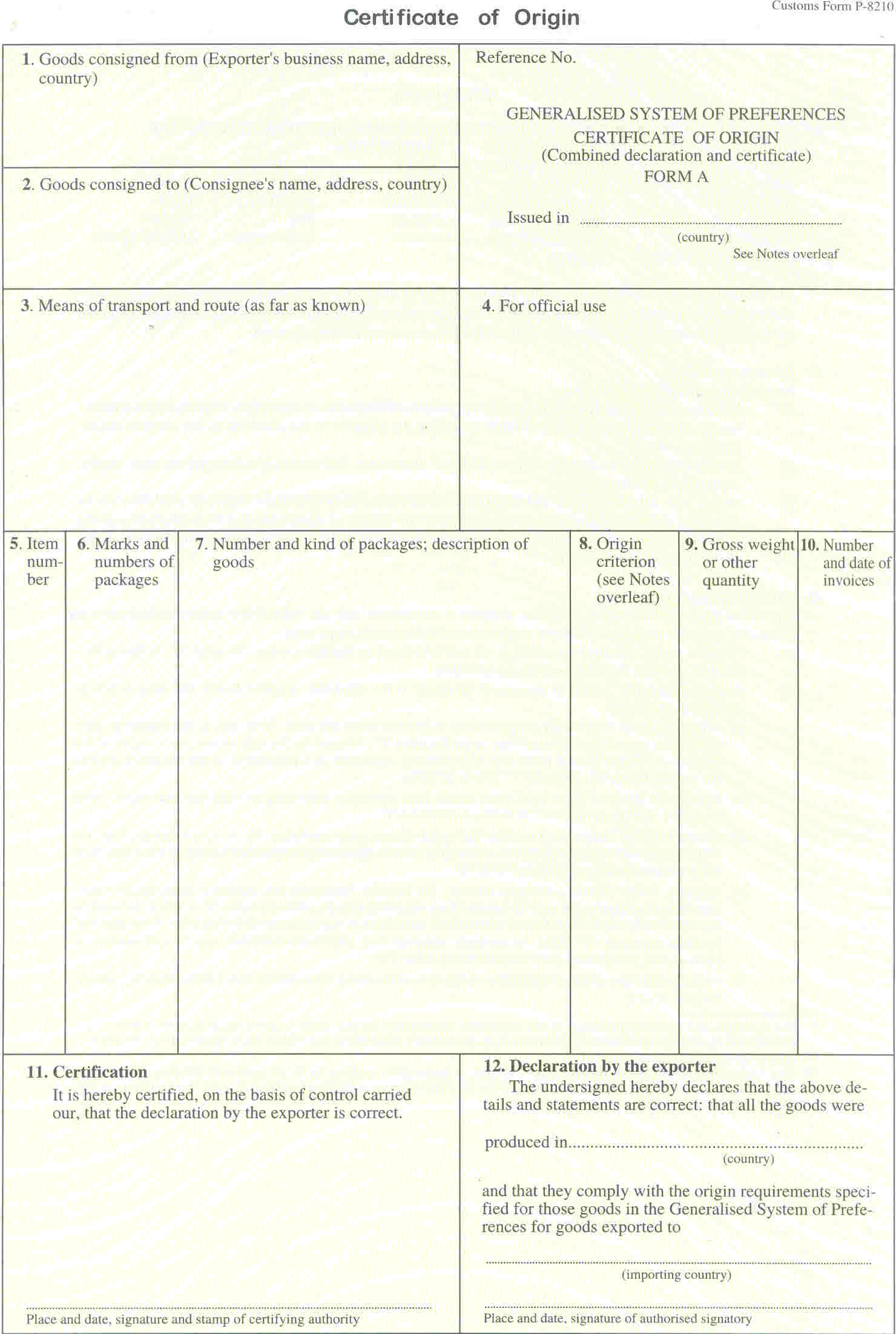 Do User:Vương Ngân Hà chụp và đưa lên Wikipedia.